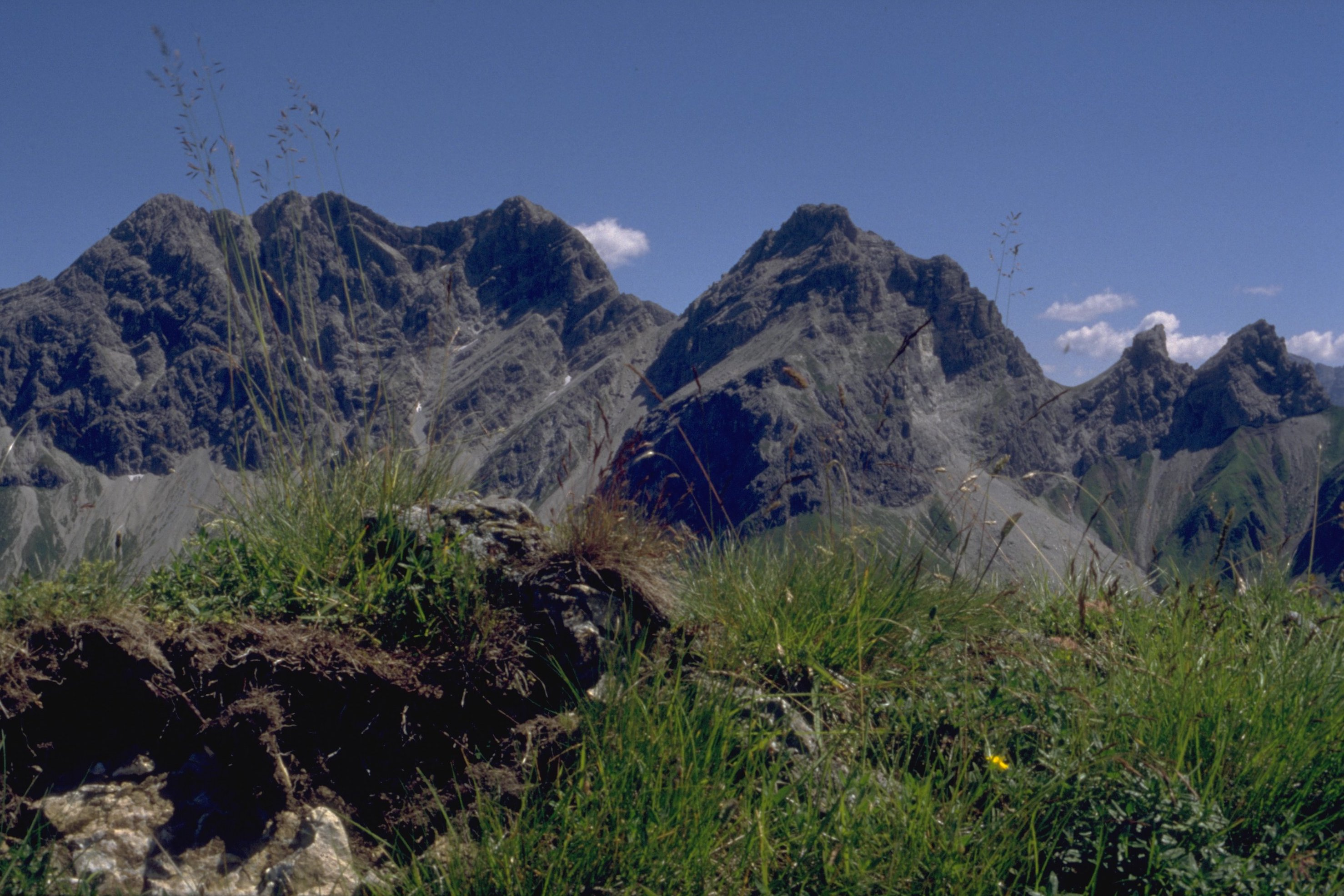 Wildengruppe vom Höfats-SSO-Grat.